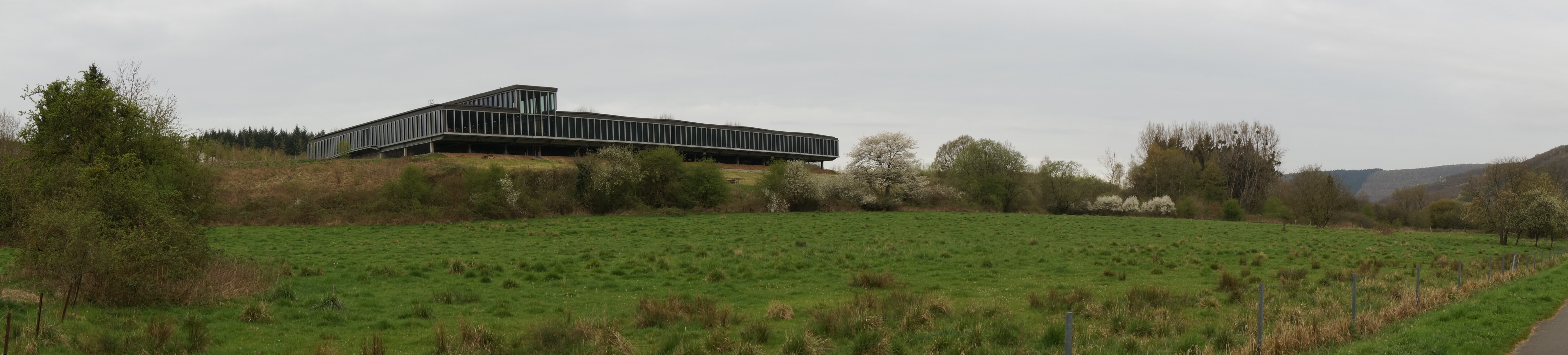 à Bogny-sur-Meuse la piste cyclable à droite , la vallée de la Meuse et l'usine Hermès, à gauche.